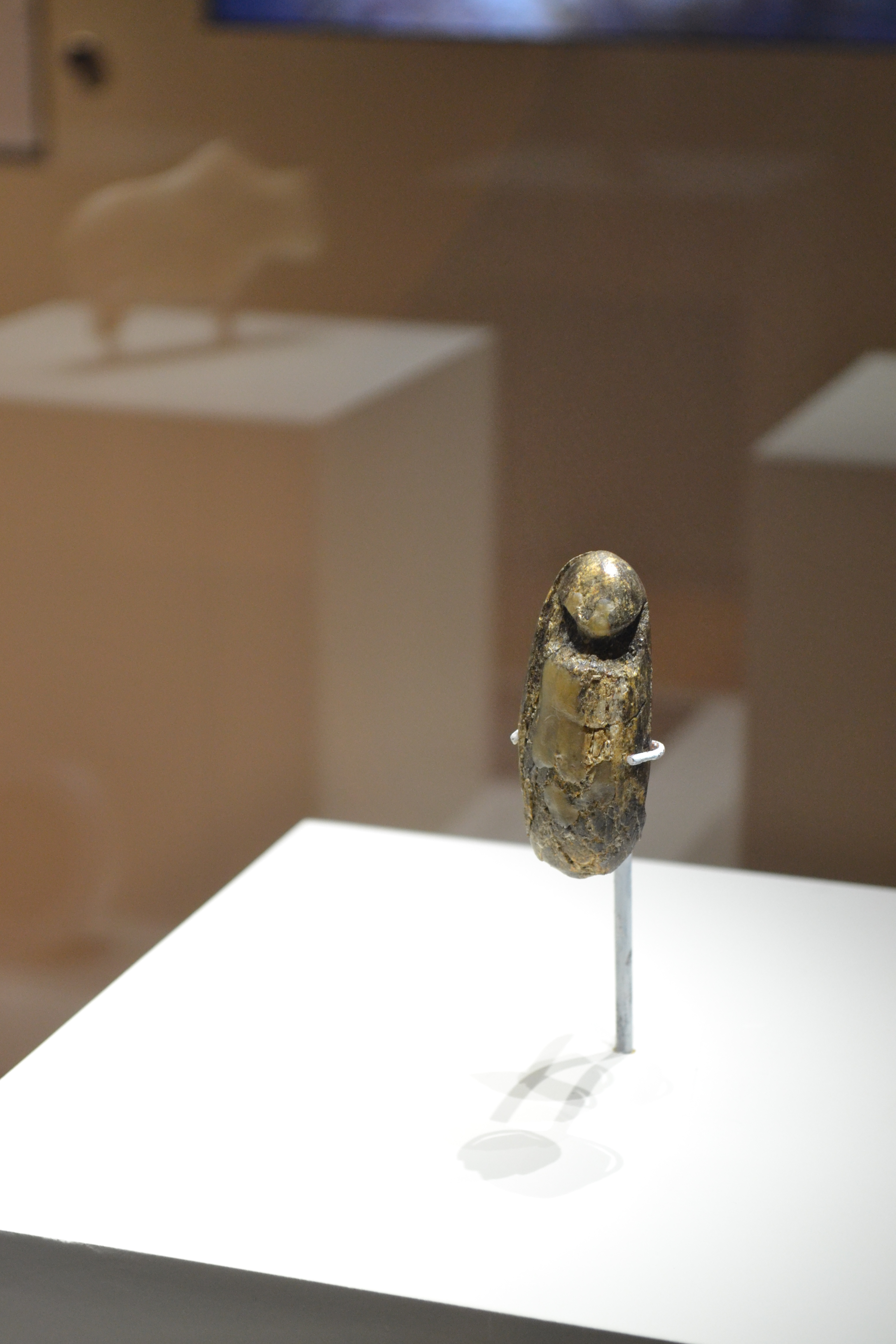 Палеолитическая статуэтка в эскпозиции музея "Зарайский Кремль". Найдена там же при археологических исследованиях Зарайской стоянки.